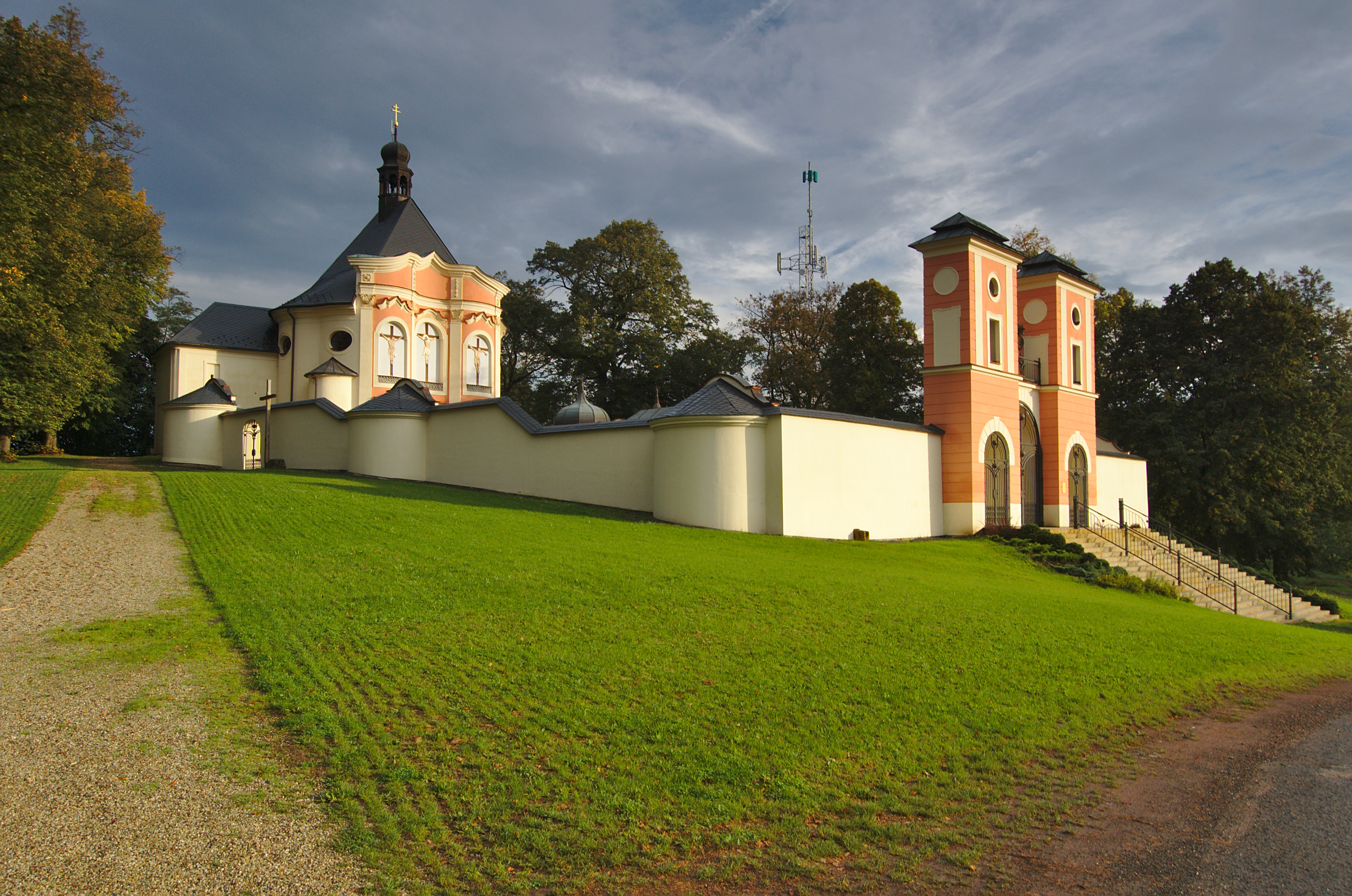 Kostel Povýšení svatého Kříže na Kalvárii - celkový pohled, Jaroměřice, okres Svitavy